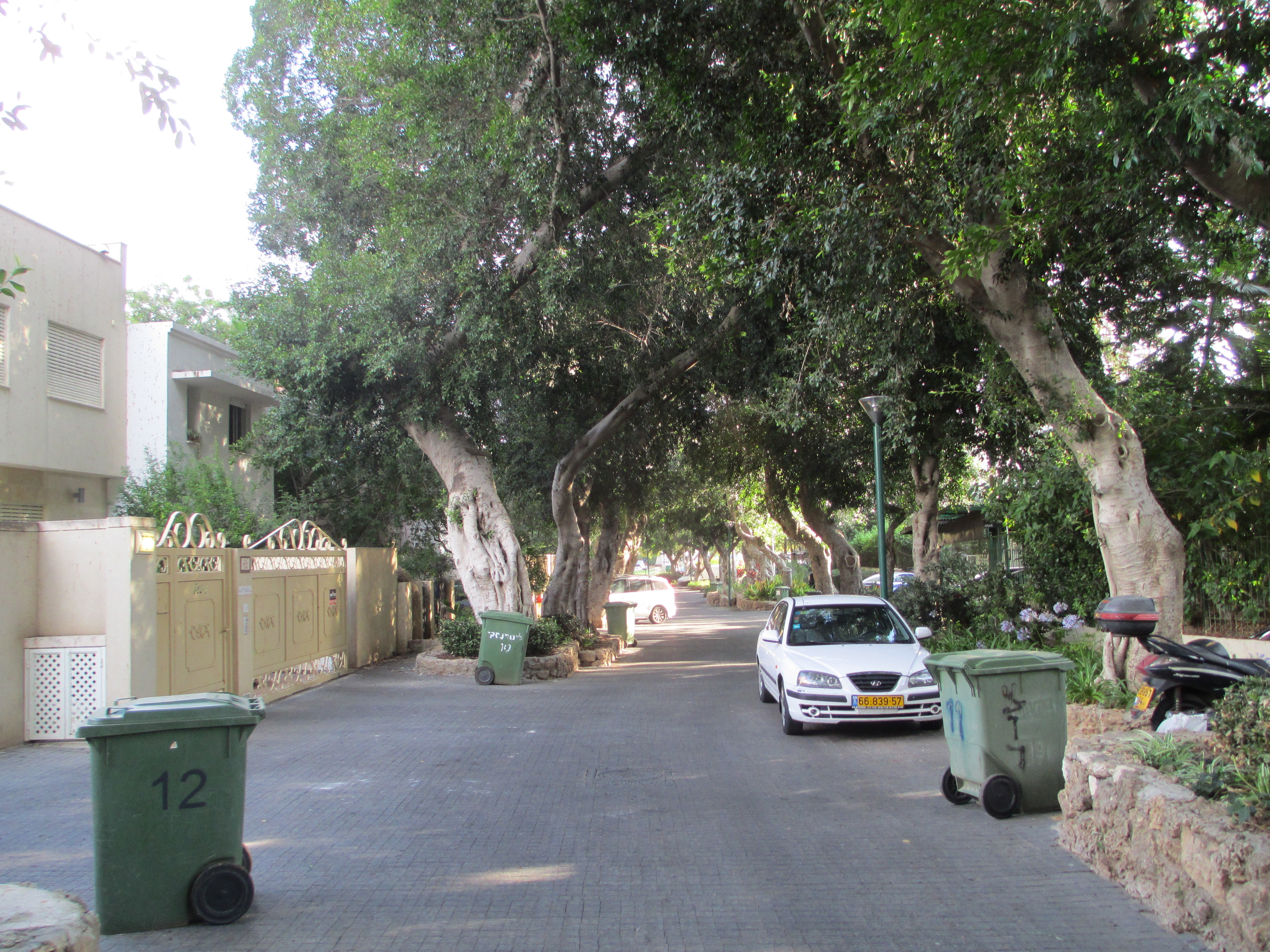 רח' ליטוינסקי בתל ליטוינסקי